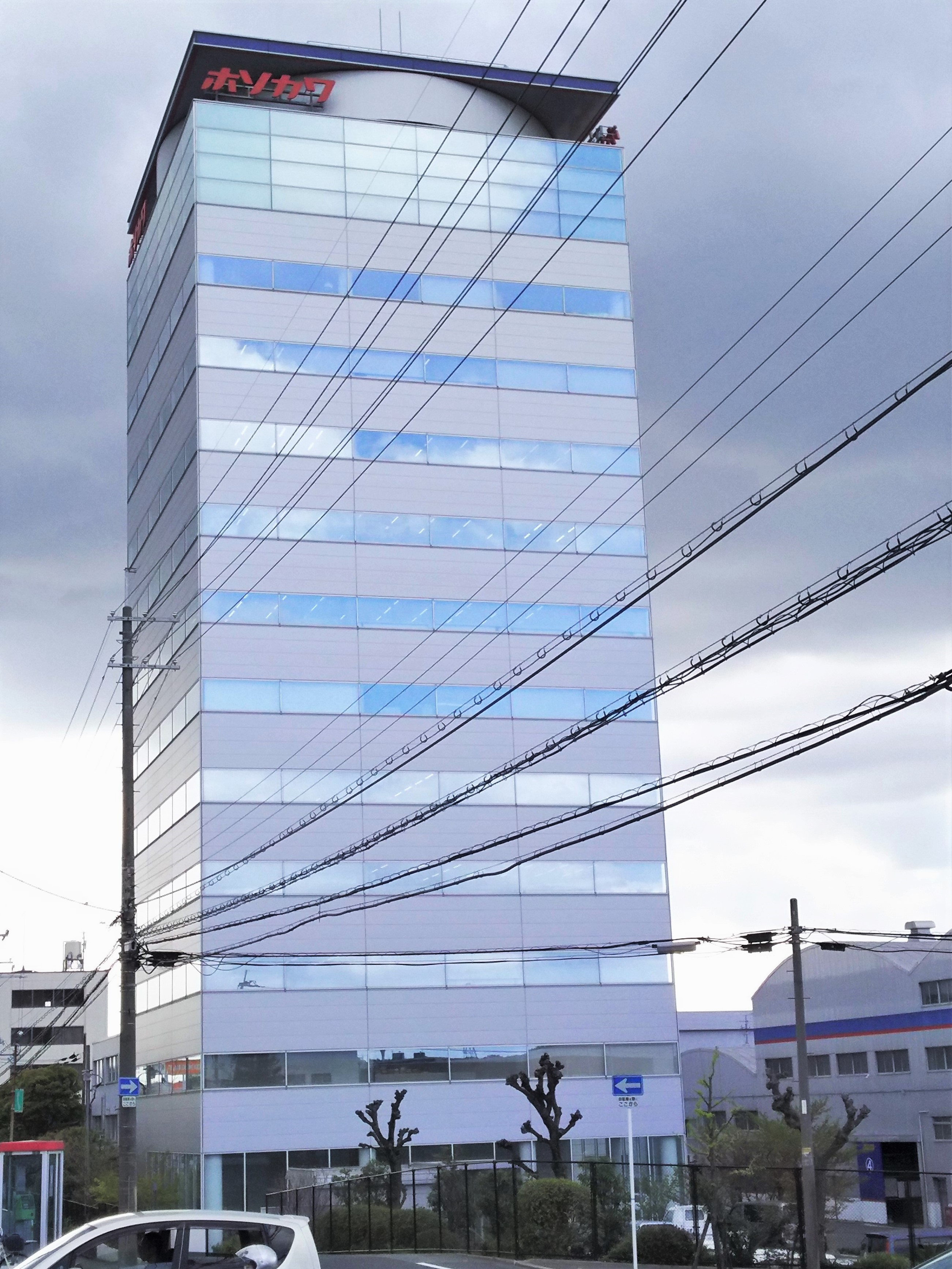 ホソカワミクロン本社（大阪府枚方市）